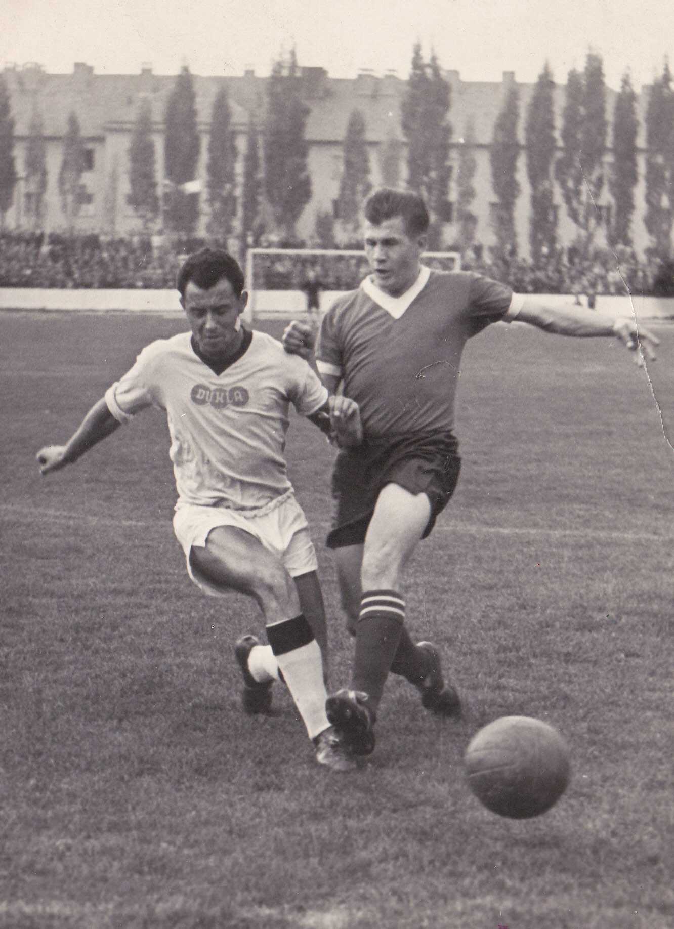 Jozef Schwarz v tmavom drese pri útoku